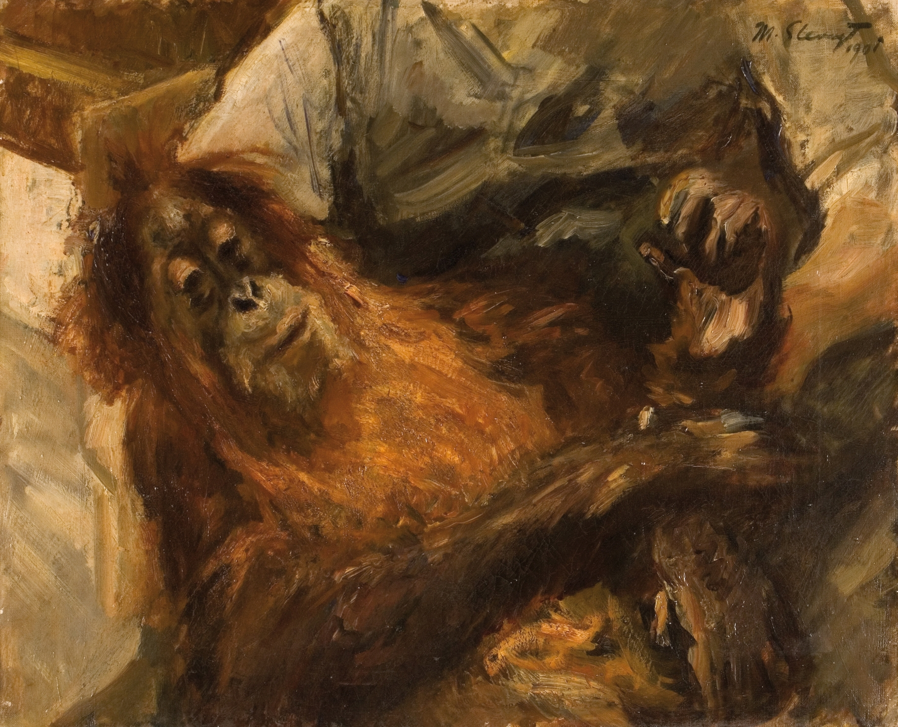 Der Orang Utan Seemann mit seinem Wärter im Frankfurter Zoo.